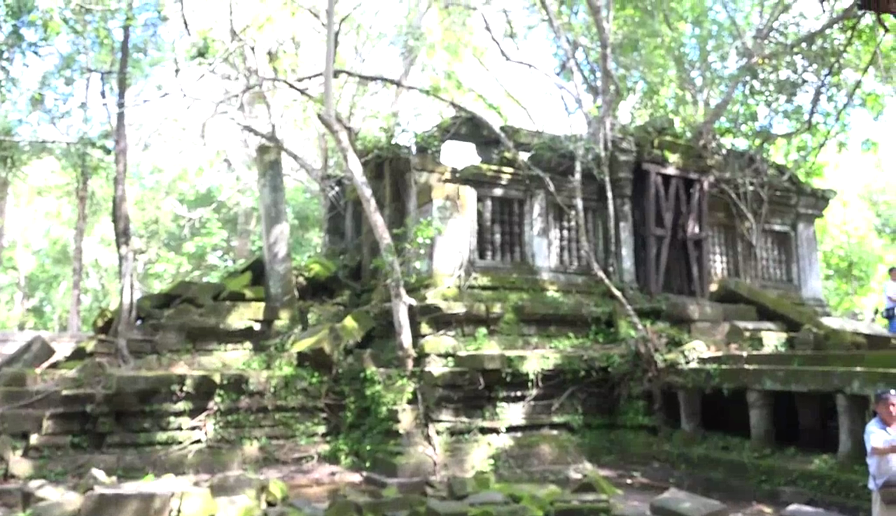 Photographies du temple cambodgien en ruine de Beng Méaléa qui aurait été construit sous le règne de Suryavarman II, entre 1112 et 1152, à 42 km à l’Est de Siem Reap.